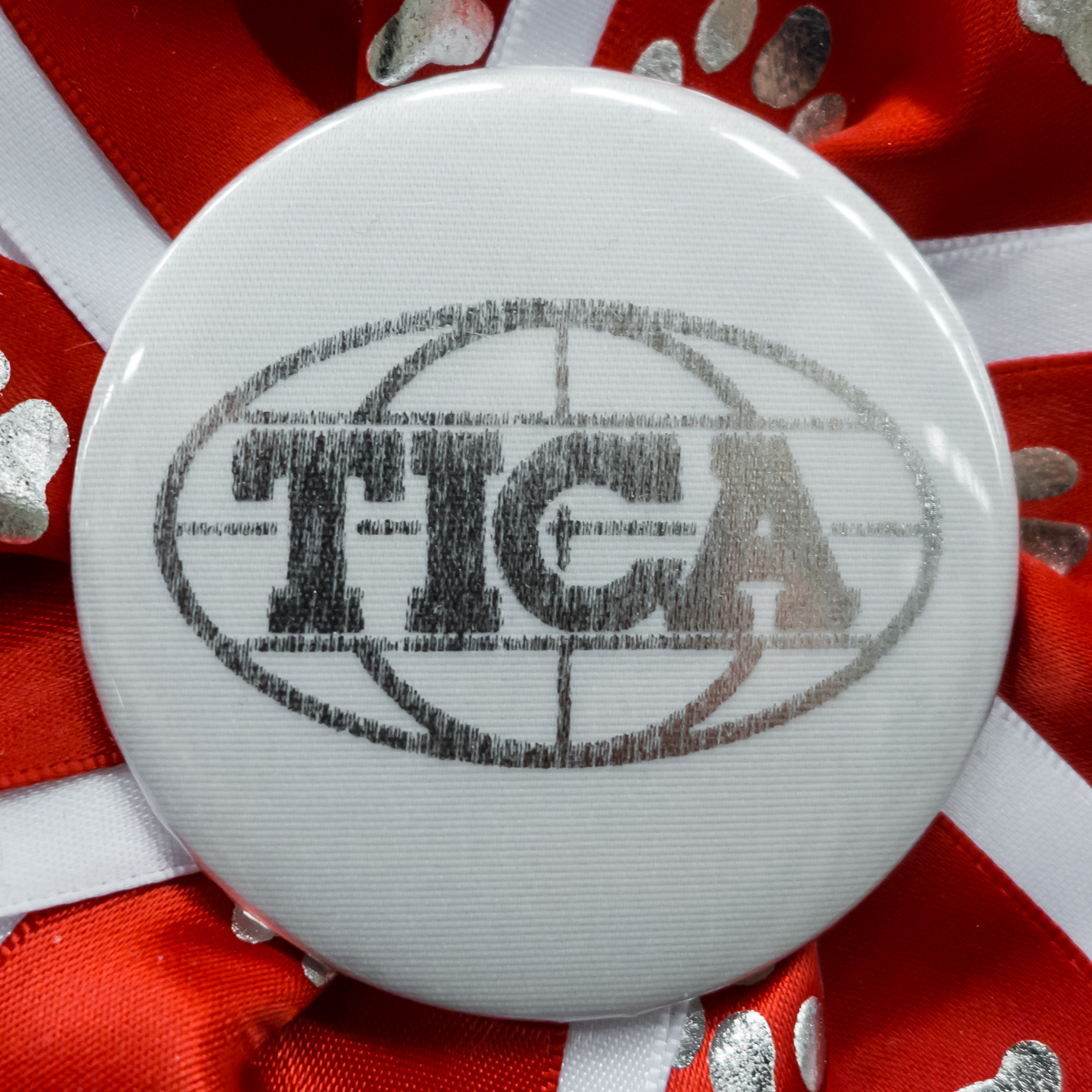 Intérieur d'une cocarde TICA à l'exposition féline d'Helsinki en 2013.